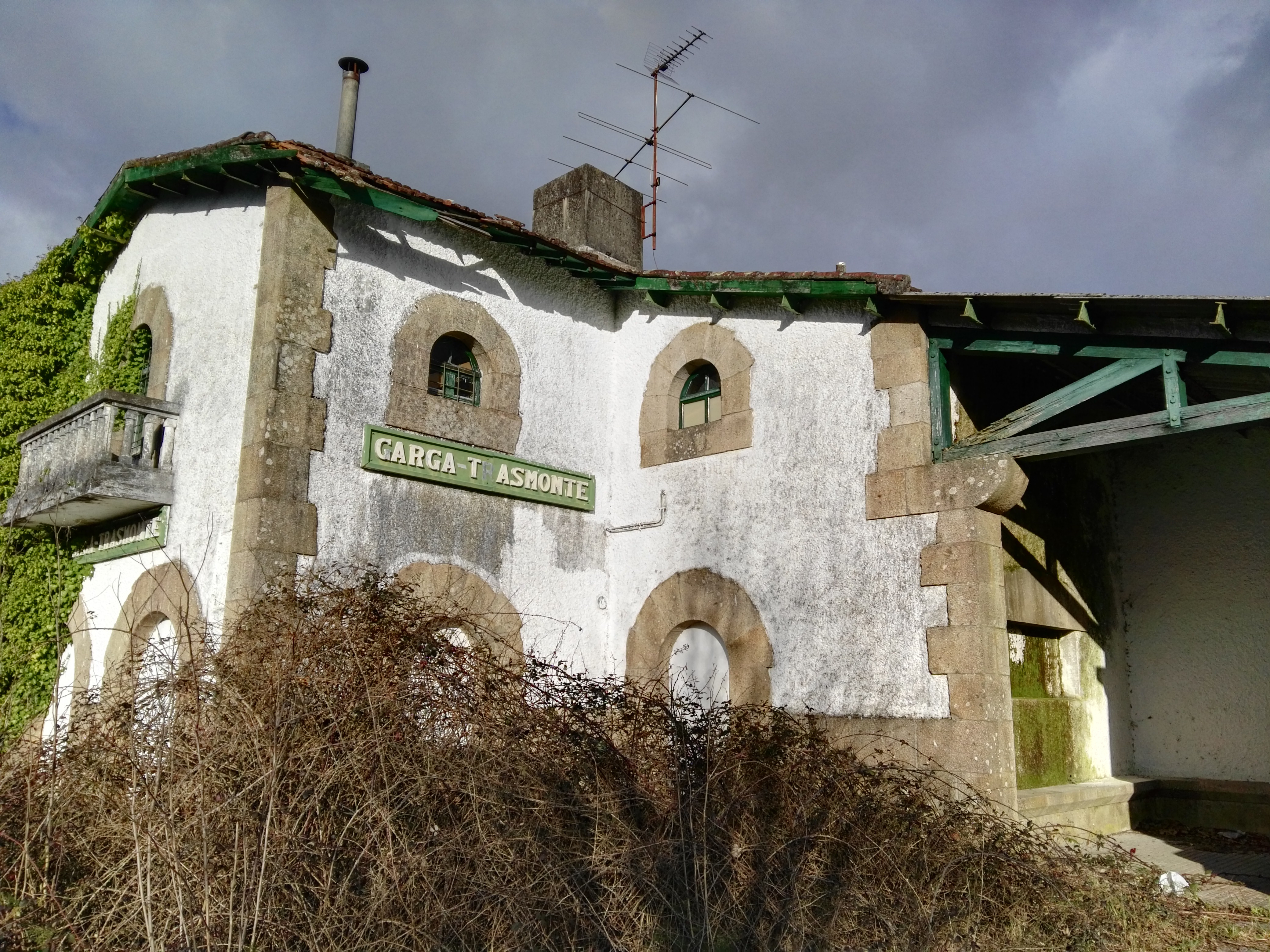 Estatacion garga trasmonte casa